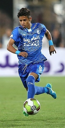 مهدی قائدی در دیدار تیم‌های فوتبال استقلال تهران و استقلال خوزستان